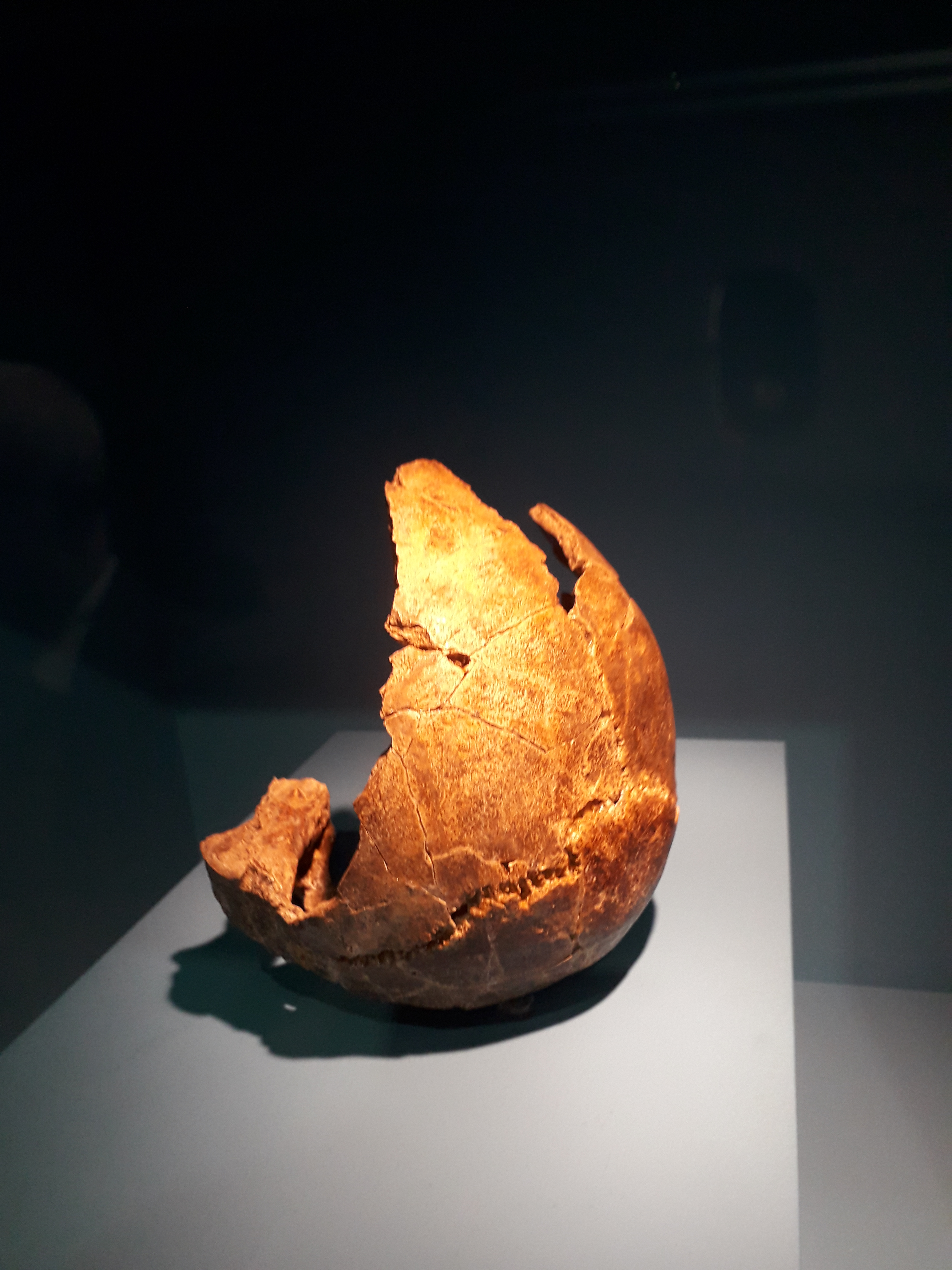 Crâne peut-être féminin de Biache 1. Os fossile. Biache-Saint-Vaast, France. Date : environ -180 000. Musée d'Archéologie nationale - Domaine national de Saint-Germain-en-Laye. Photographié à l'exposition "Néandertal, l'expo" au musée de l'Homme à Paris en avril 2018.